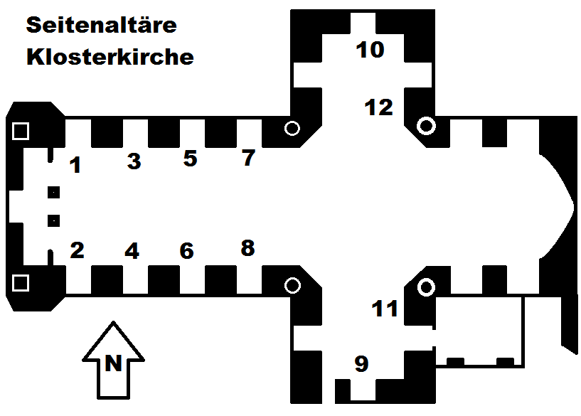 schematischer Grundriss, Klosterkirche Münsterschwarzach, Darstellung der Seitenaltäre: Legende: 1. Johann Zick "Kreuzabnahme", 2. Johann Zick "Franz de Paula", 3. Balthasar Augustin Albrecht "Ecce Homo", 4. Balthasar Augustin Albrecht "Sebastianspflege", 5. Johann Joseph Scheubel d.Ä. "Hl. Anna mit Joachim und Maria", 6. Giandomenico Tiepolo "Stephanussteinigung", 7. Giambattista Piazetta "Anbetung der Hirten", 8. Giambattista Tiepolo "Anbetung der Könige", 9. Johann Georg Bergmüller "Kreuzigung", 10. Johann Georg Bergmüller "Verkündigung", 11. Balthasar Augustin Albrecht "Hl. Scholastika", 12. Balthasar Augustin Albrecht "Tod des hl. Benedikt"